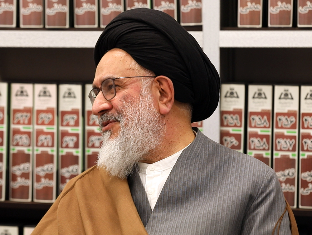 آیت الله دکتر سیدمصطفی محقق داماد در مرکز پژوهشی دانشنامه های حقوقی علامه